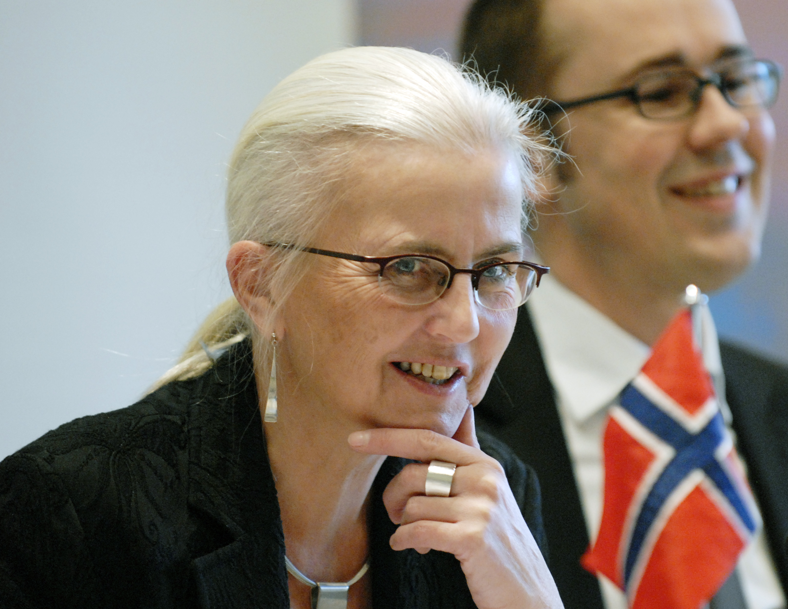 Helen Bjørnøy, norsk miljöminister, under nordiskt miljöministermöte i Köpenhamn 2006-03-16.